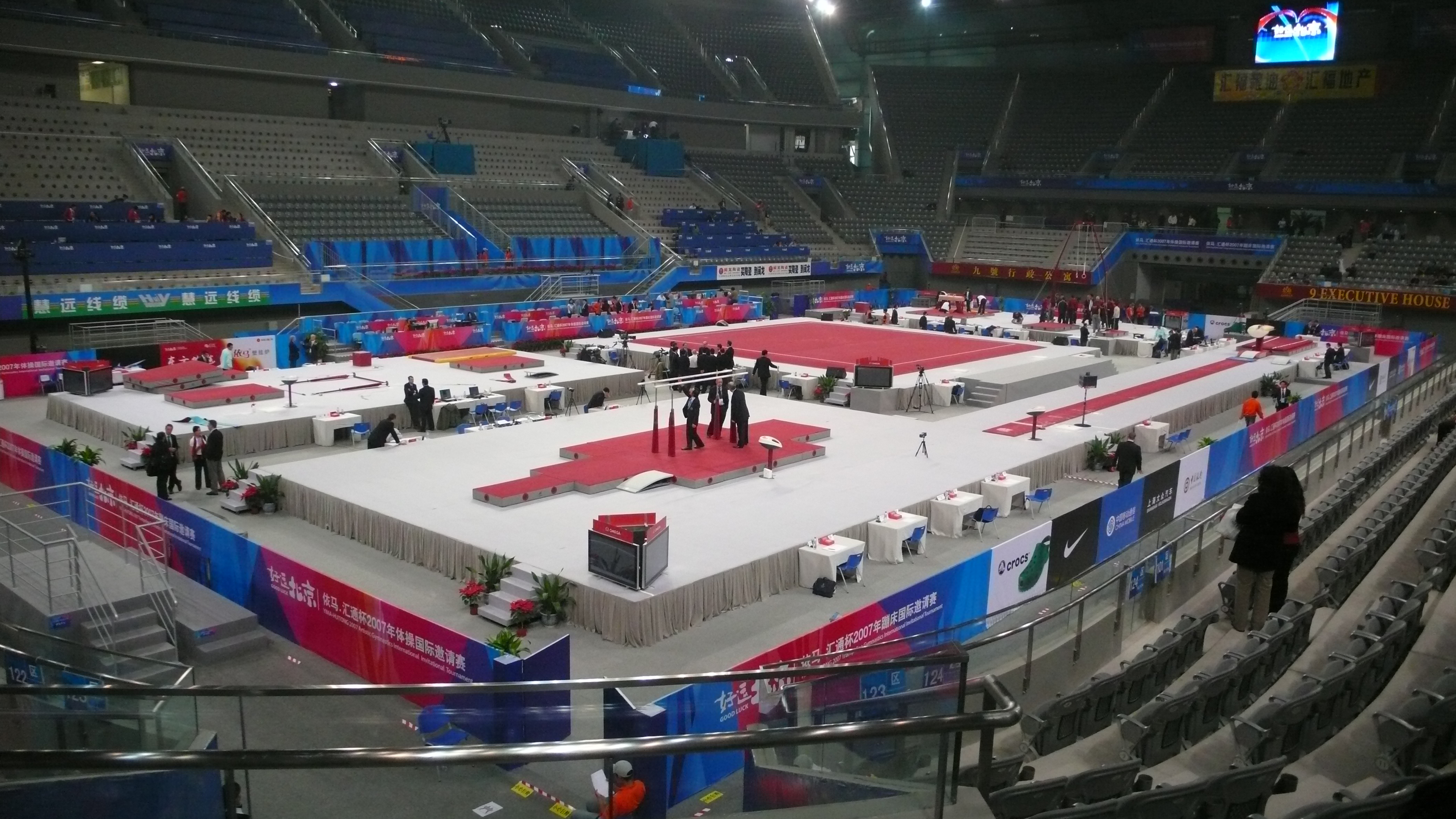 中文（中国大陆）: 中国国家体育馆